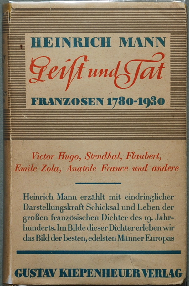 Mann, Heinrich: Geist und Tat. Franzosen 1780 - 1930. Berlin: Kiepenheuer 1931, 301 Seiten. Erstdruck (Wilpert/Gühring² 61)